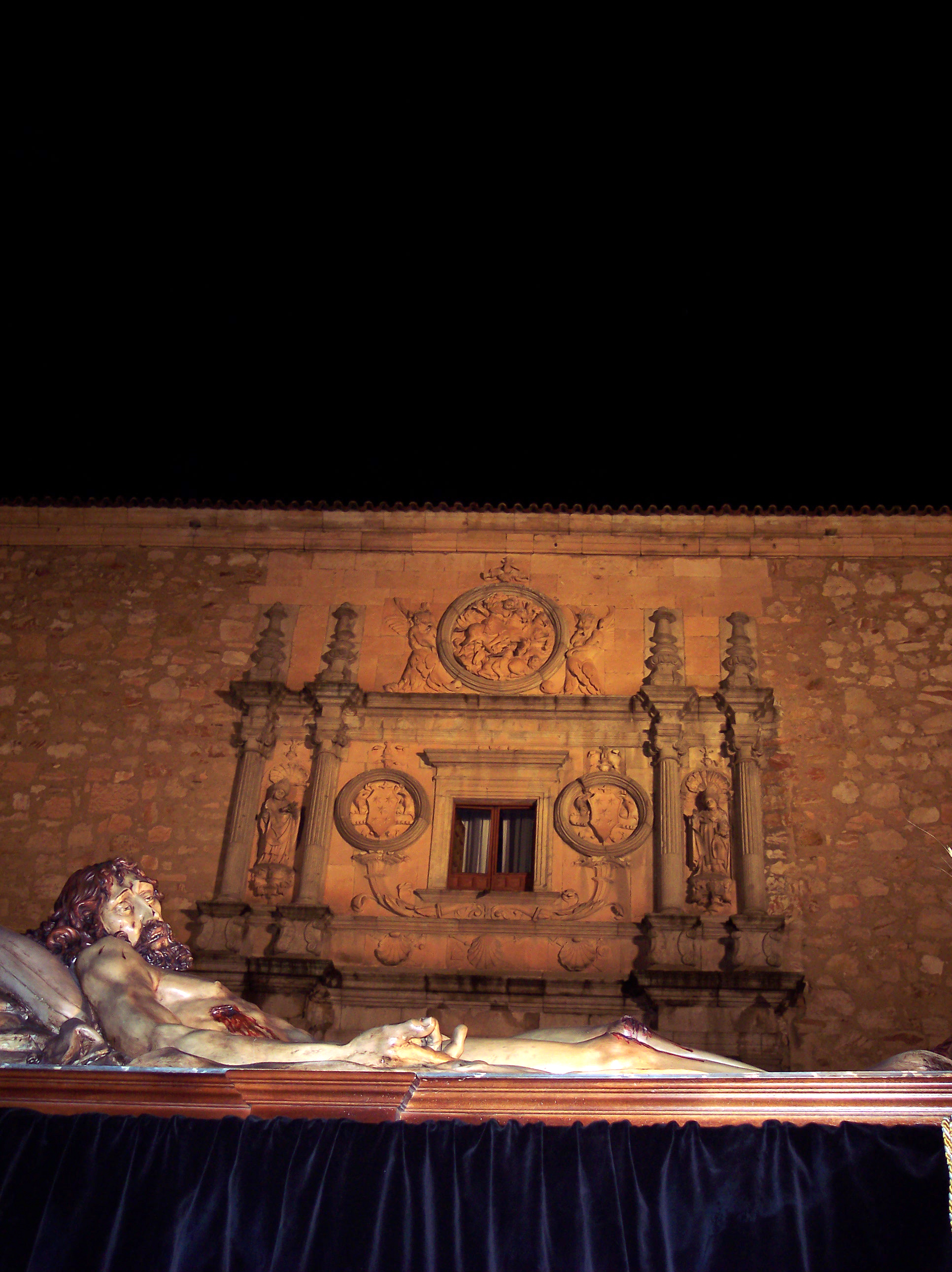 Cristo de la Liberación, Salamanca